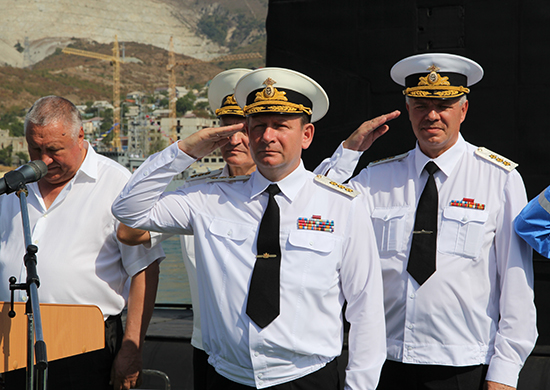 Главком ВМФ РФ Виктор Чирков и командующий ЧФ РФ Александр Витко на церемонии встречи дизель-электрической подводной лодки «Новороссийск» на Новороссийской военно-морской базе